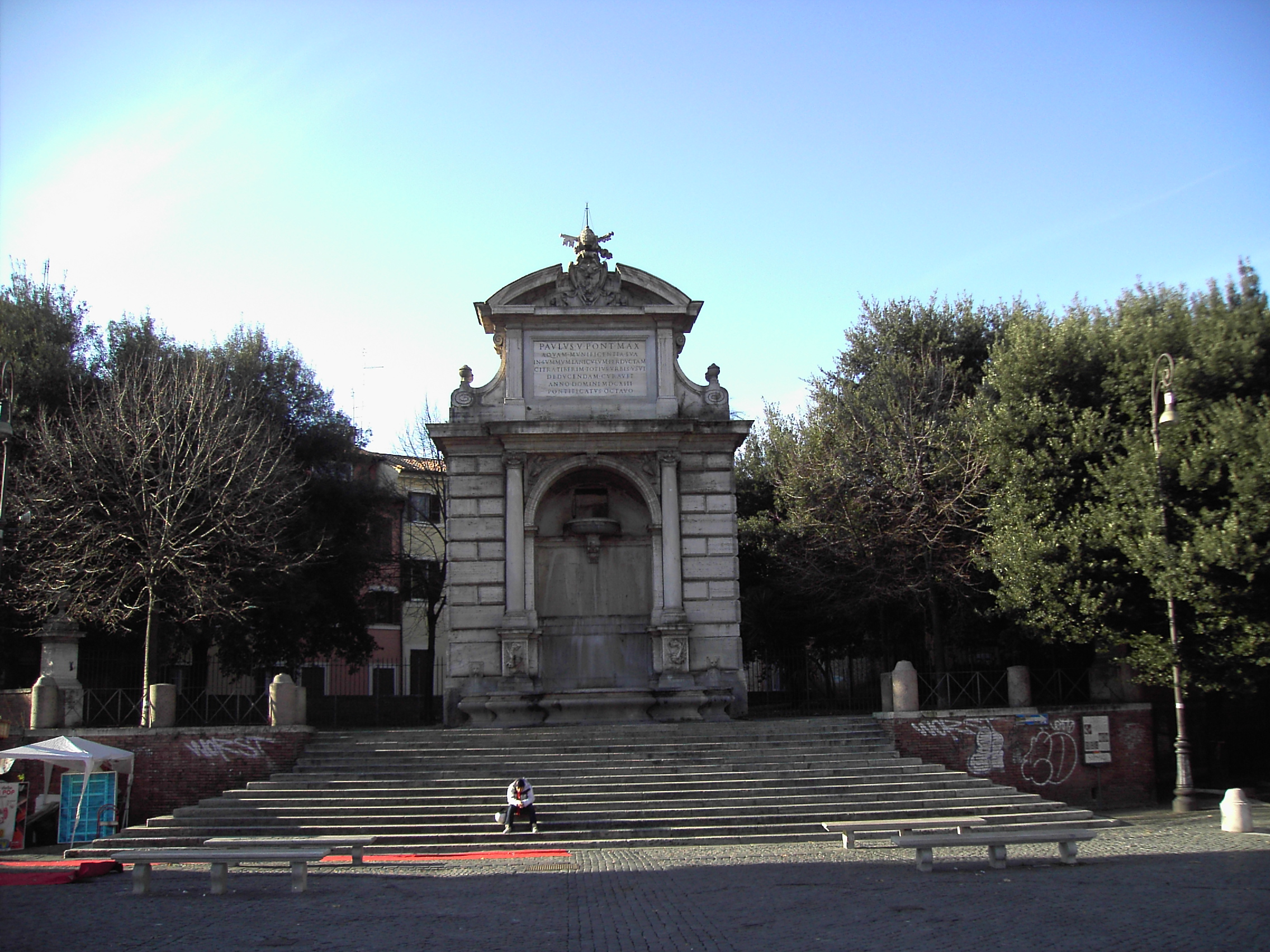 Roma, Trastevere: fontana dell'Acqua Paola (da Paolo V) detta "Fontanone dei cento preti". La lapide, che commemora l'arrivo dell'acqua a Trastevere, recita: PAVLVS V PONT MAX AQVAM MVNIFICENTIA SVA IN SVMMVM IANICVLVM PERDVCTAM CITRA TIBERIM TOTIVS VRBIS USU DEDVCENDAM CVRAVIT ANNO DOMINI MDCXIII PONTIFICATVS OCTAVO